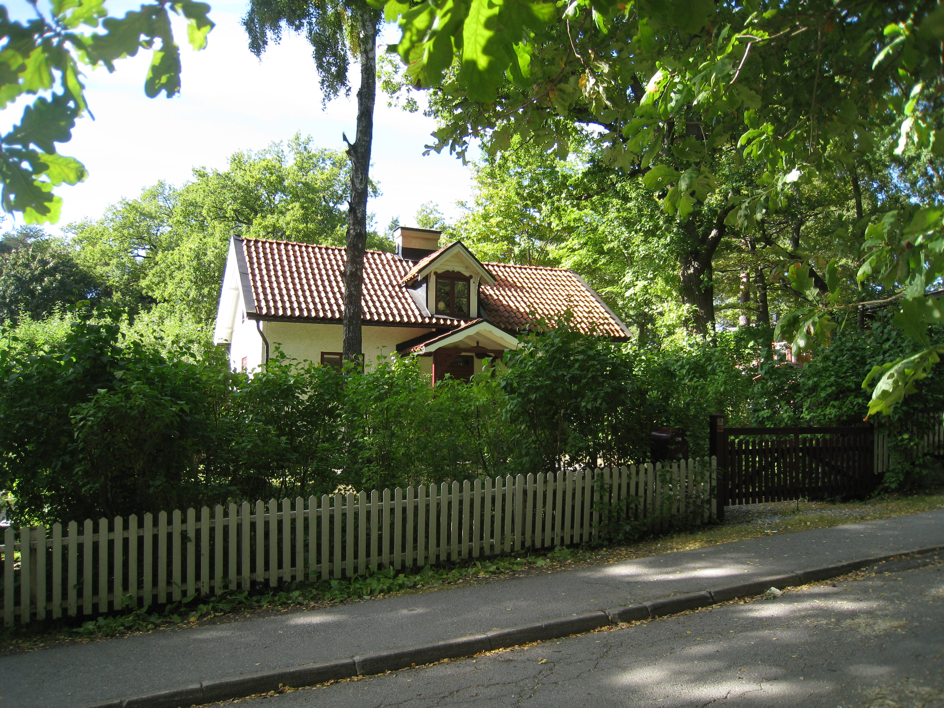 Olovslunds torp, Olovslundsvägen 19A i Olovslund i Bromma, väster om Stockholm. Torpet byggdes 1896 av Johannes Olsson (1855-1925), som var brukare, tidigare snickare och smed på Åkeshovs gård.